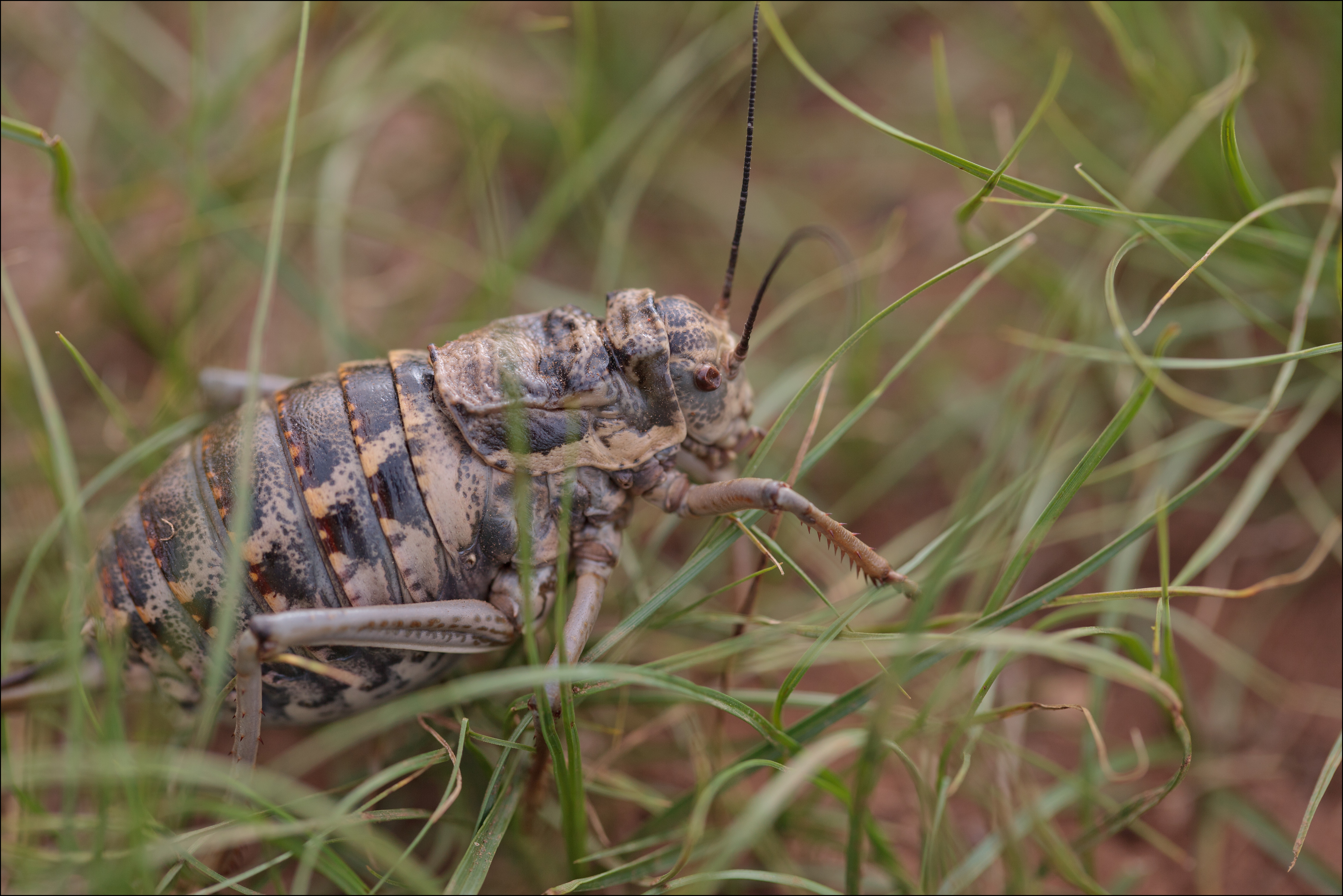 Толстун Палласа